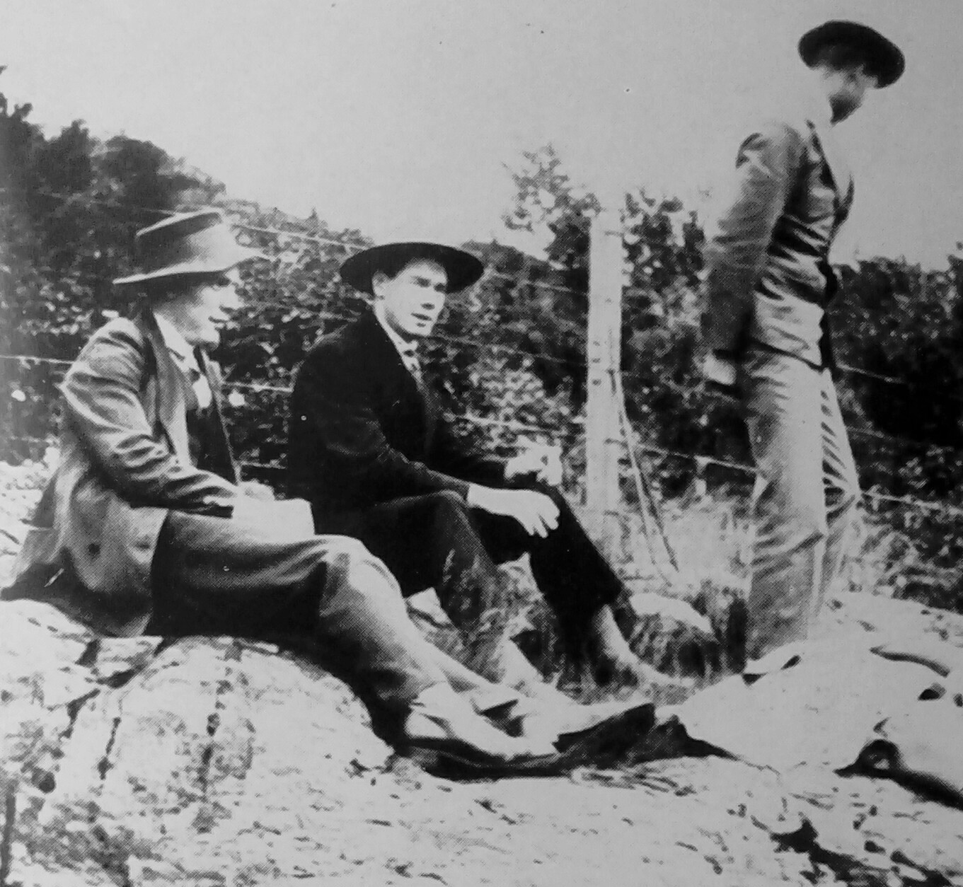 De svenska författarna Erik Asklund, Artur Lundkvist och Josef Kjellgren.